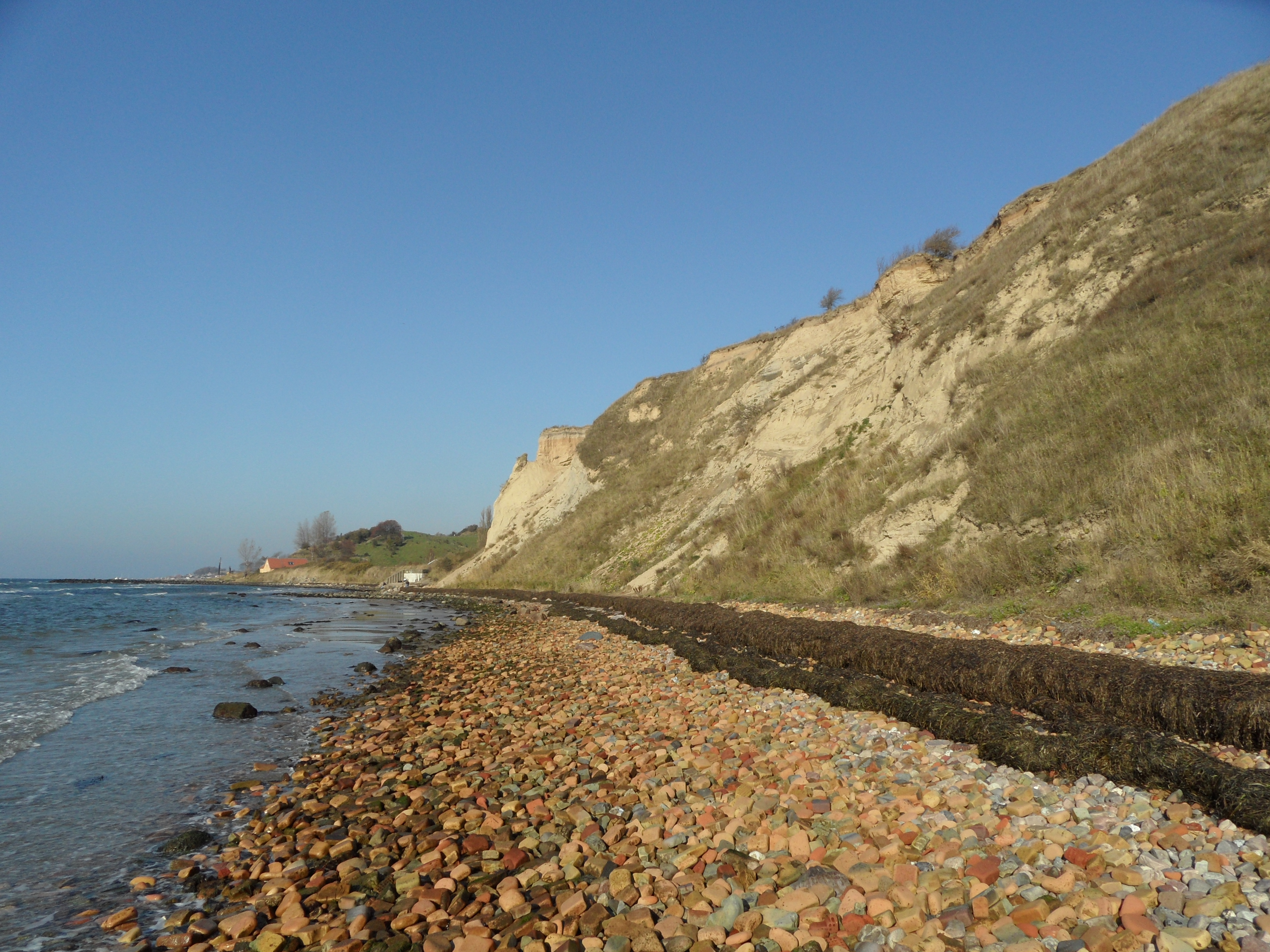 Naturreservat Hilleshögs dalar stranden med kasserat tegel